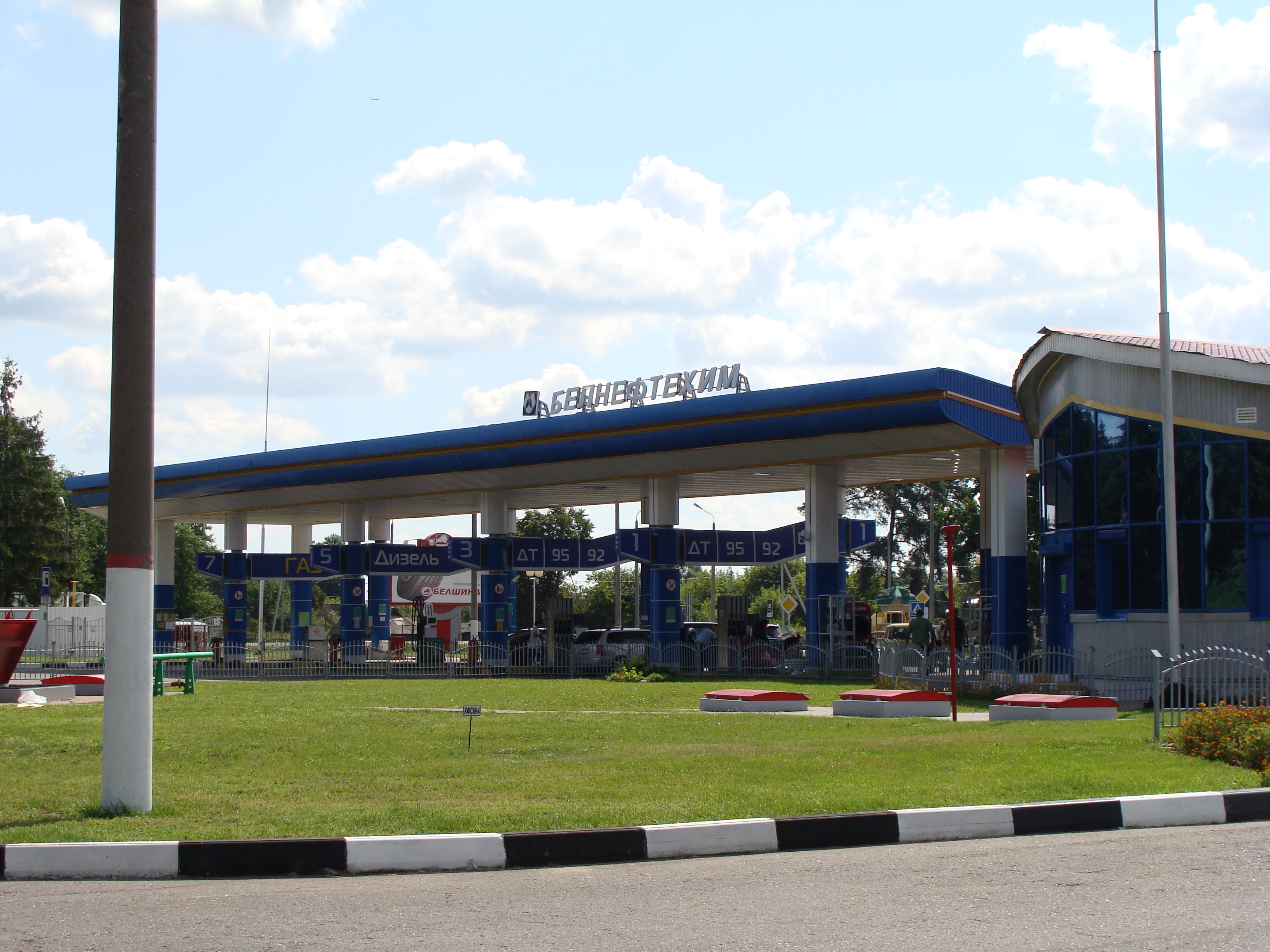 АЗС БелНефтеХим